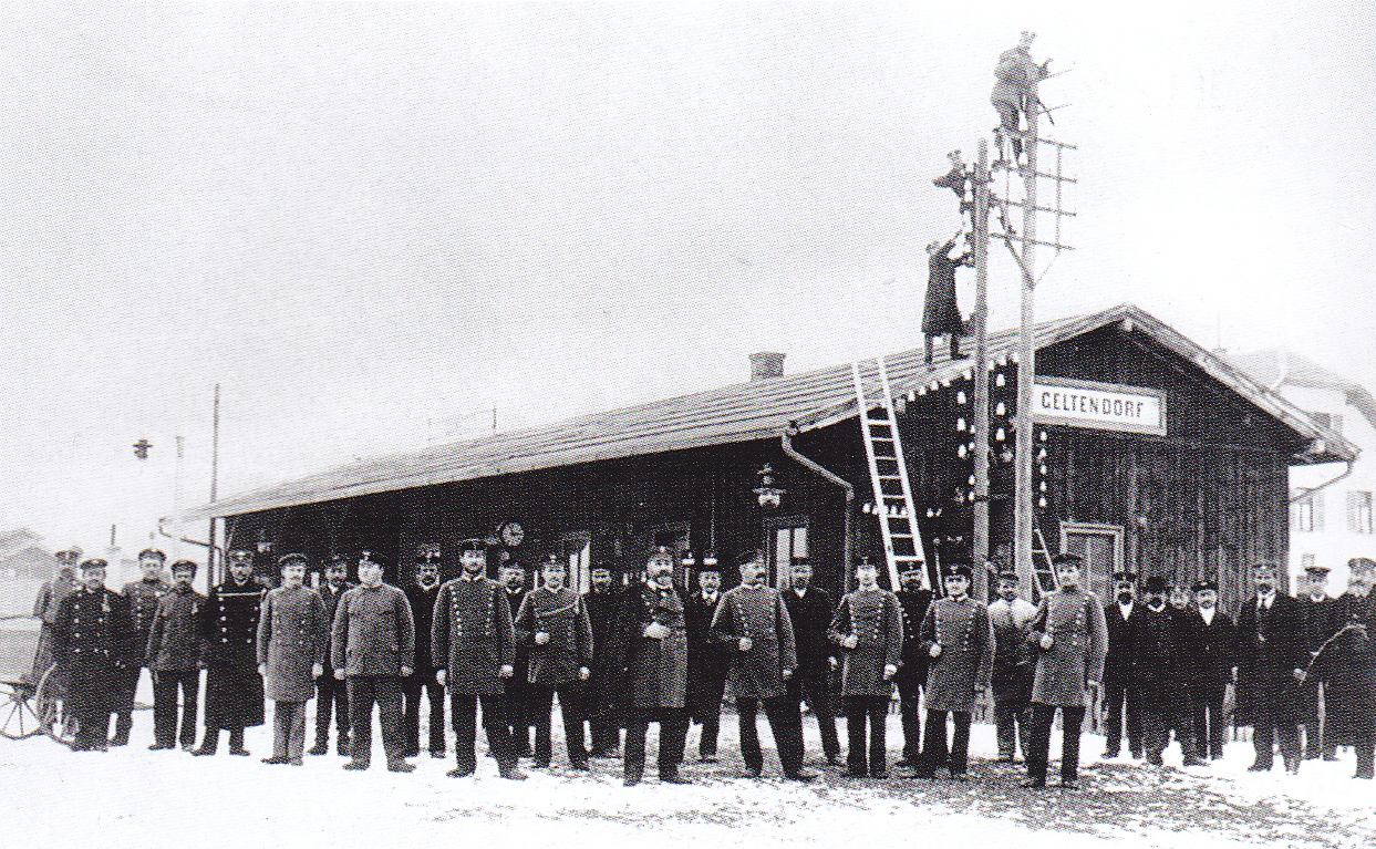 Empfangsgebäude des Bahnhofs Geltendorf mit versammeltem Bahnhofspersonal